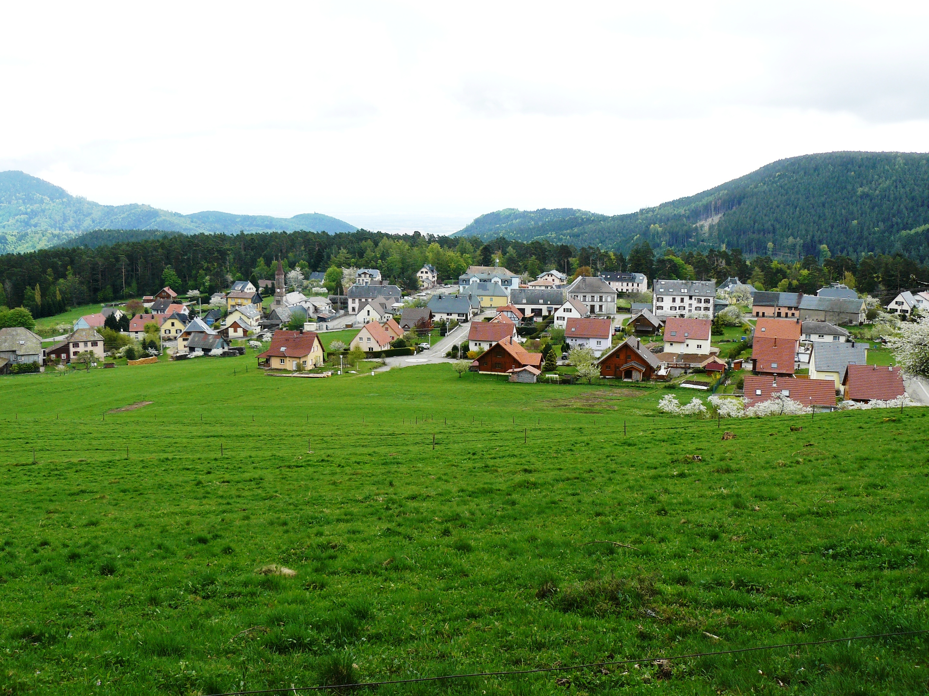 Vue sur Aubure